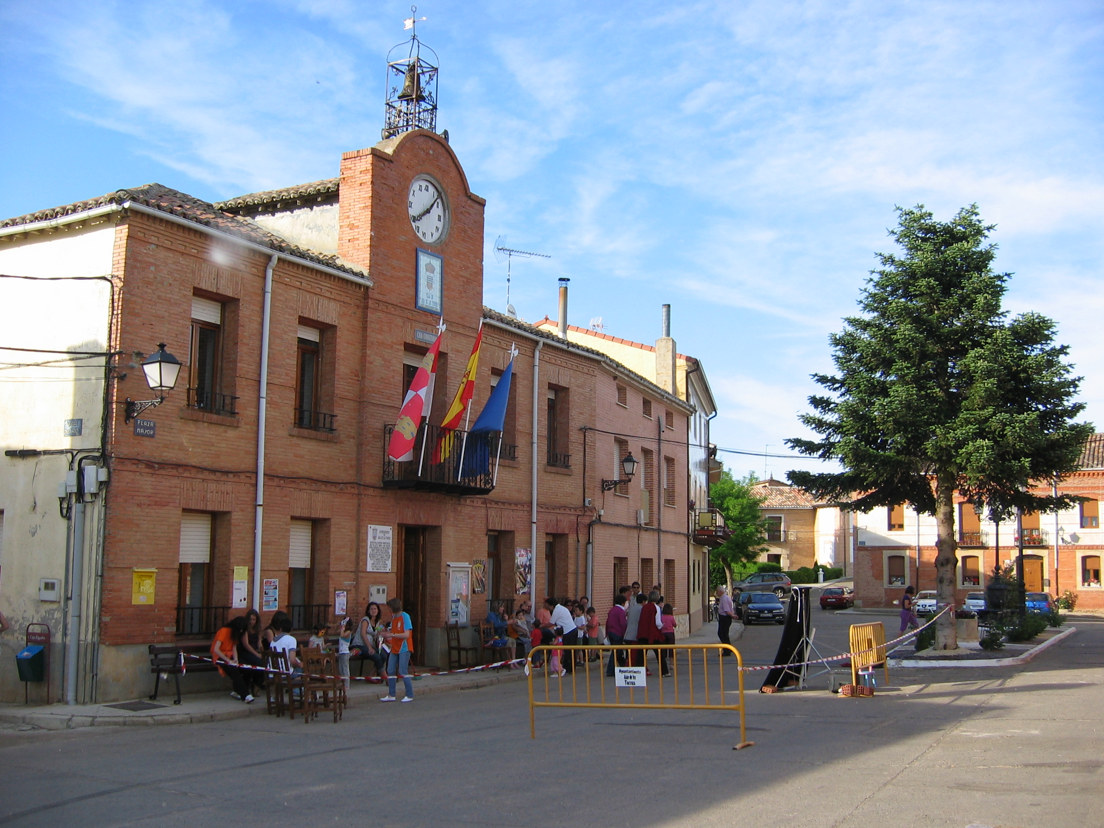 Plaza mayor de Abia de las Torres (Palencia, Castilla-León). En primer plano el ayuntamiento de la villa.